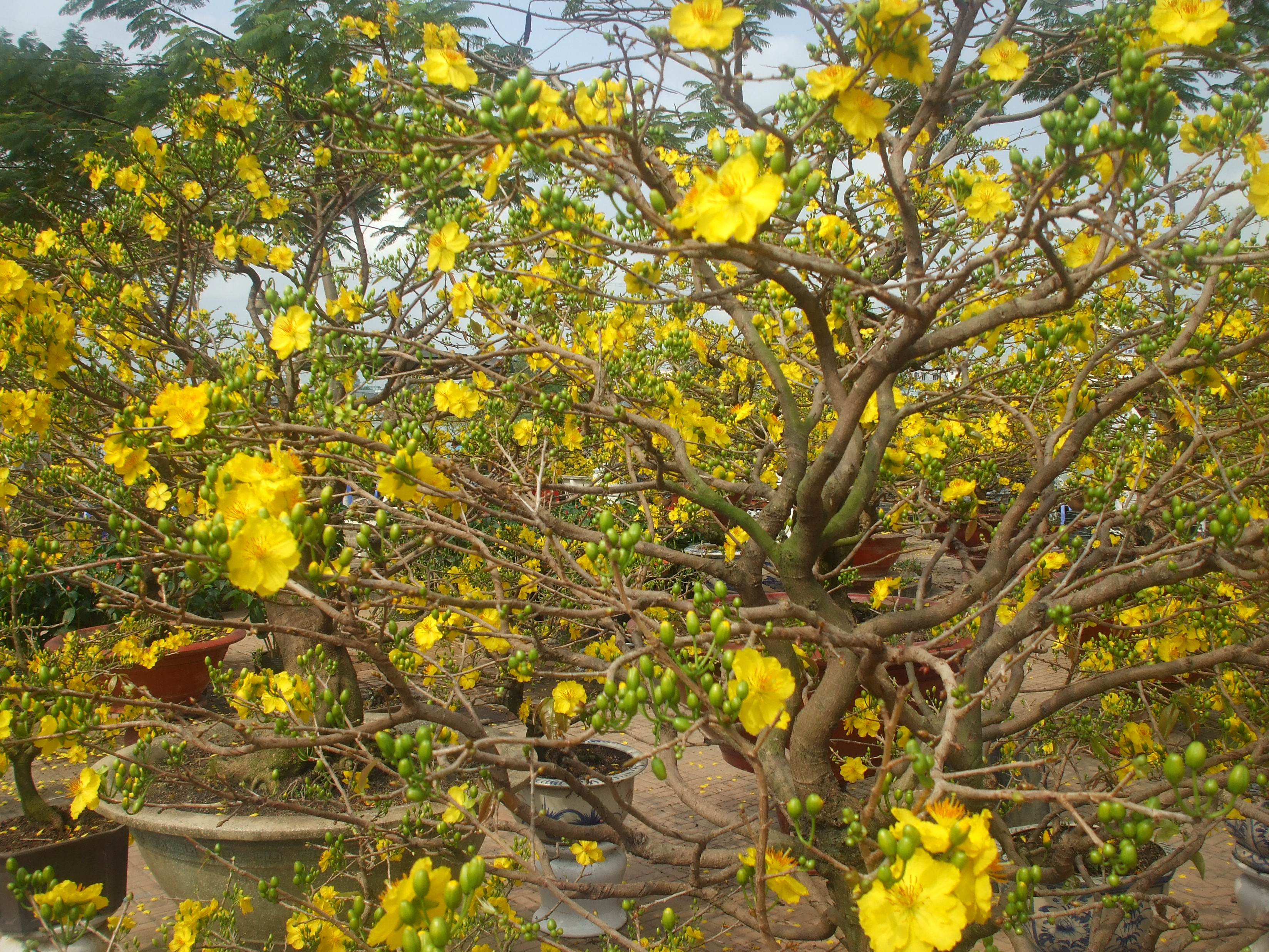 Mai vàng ngày Tết tại miền Nam Việt Nam.